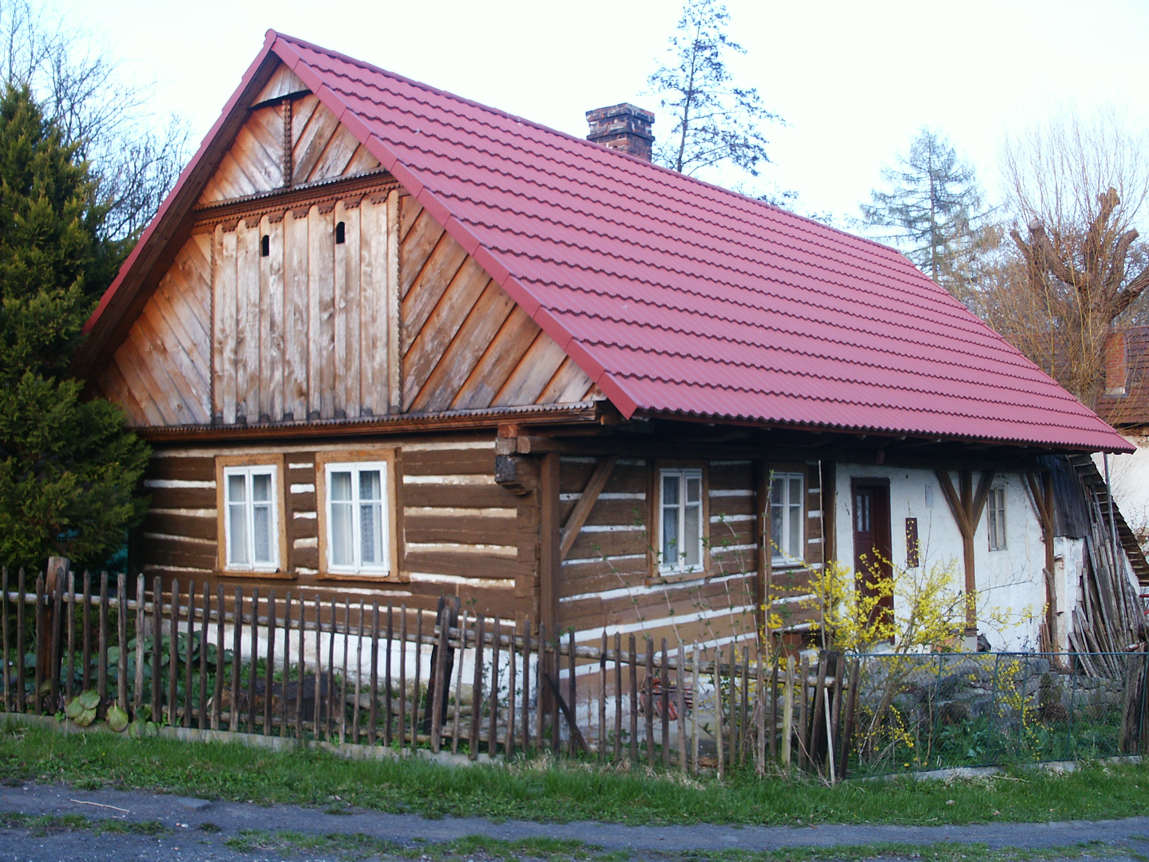 Dolní Lochov - č.p. 5